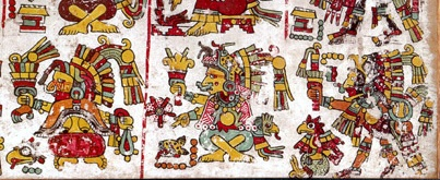 Xochiquétzalli y Quetzalcoatl, dos de las deidades descritas en la pàgina 07 del Codice Nuttall.